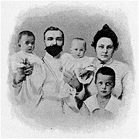 L'Illustration